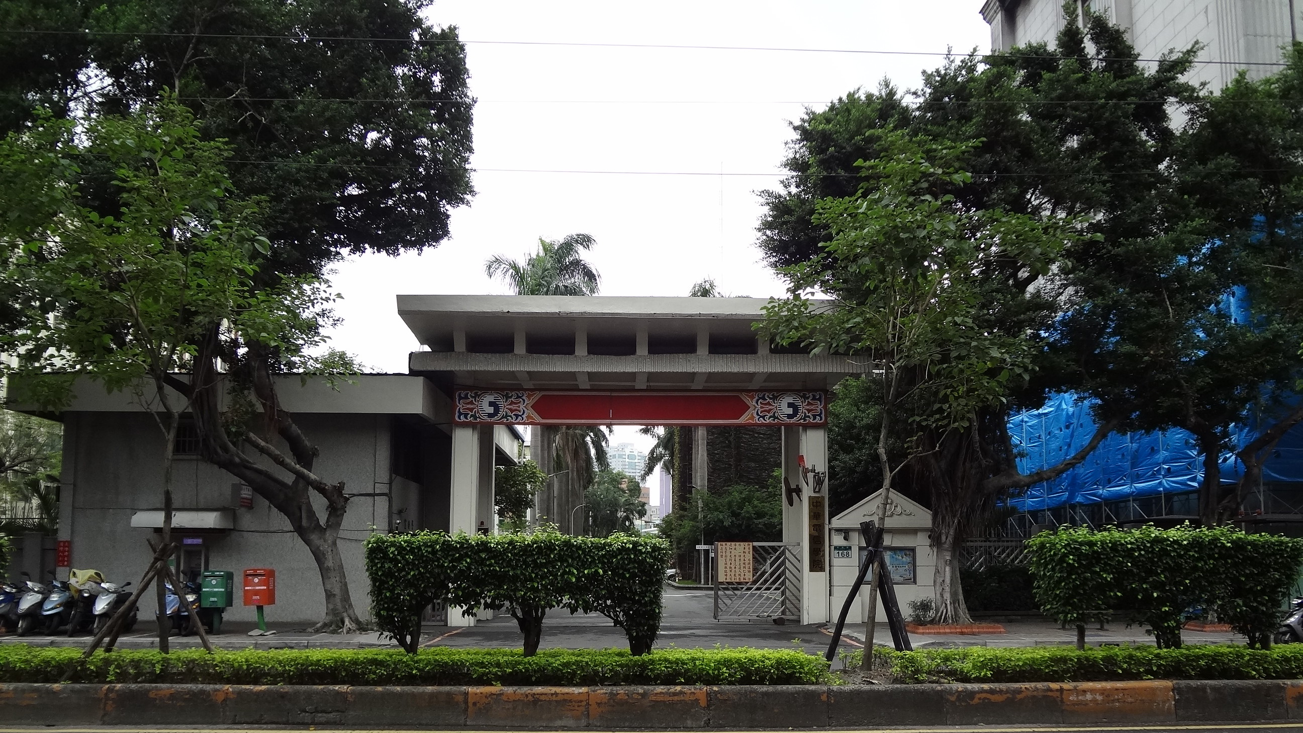 中華電信學院，位於新北市板橋區民族路168號。